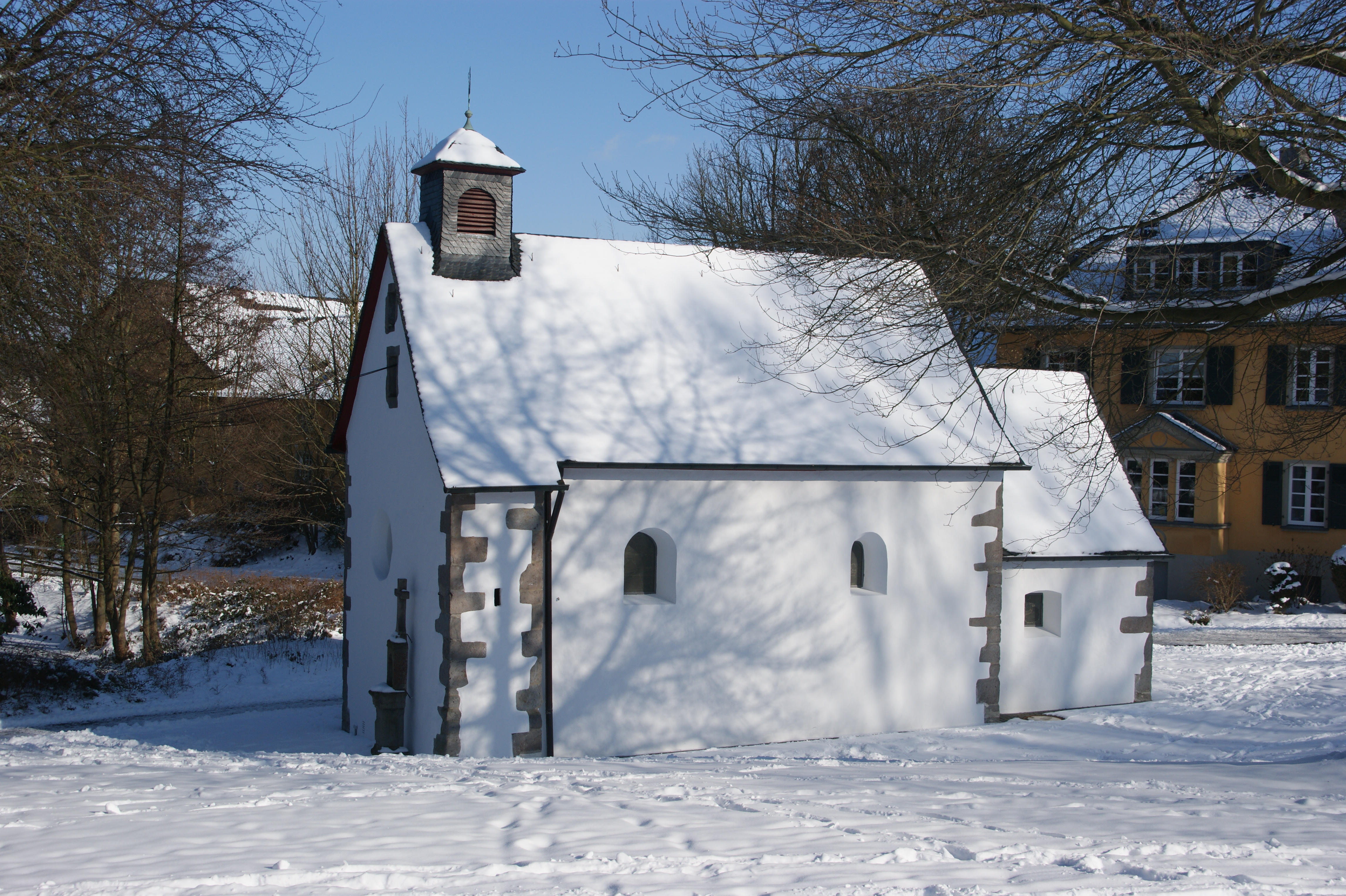 Nikolauskapelle in Königswinter-Heisterbacherrott